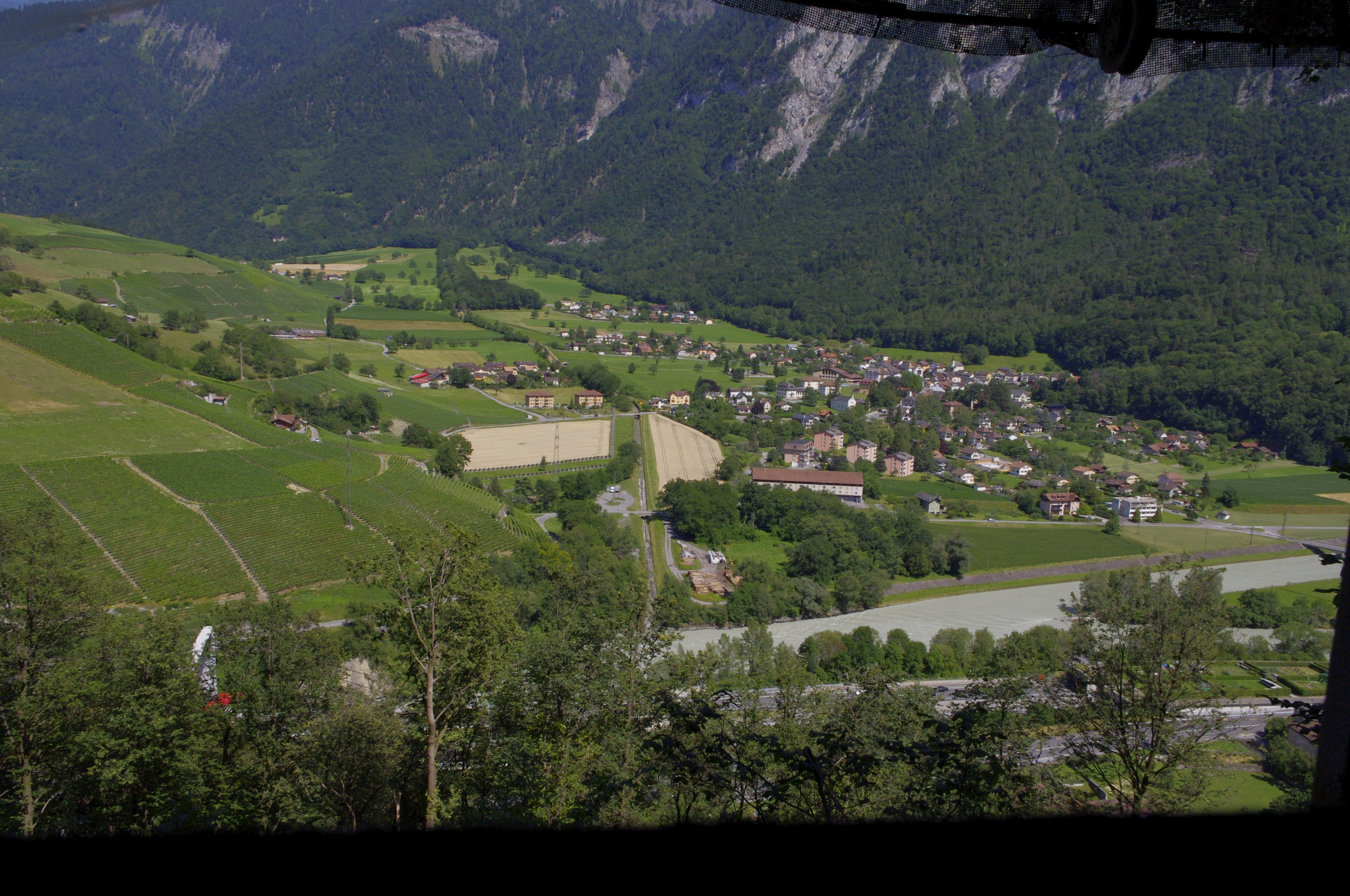 Fort Cindey, Blick auf das Tal